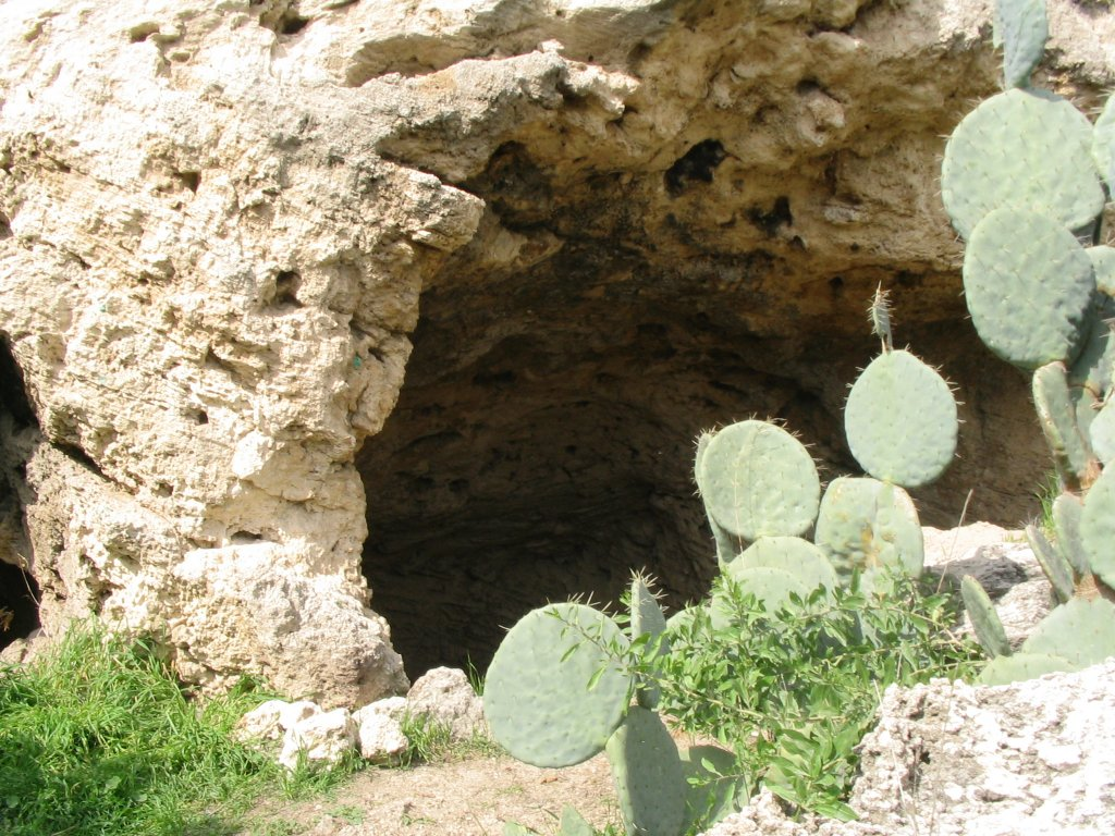 מערה באזור גדרה, מעל אנדרטת הצנחנים